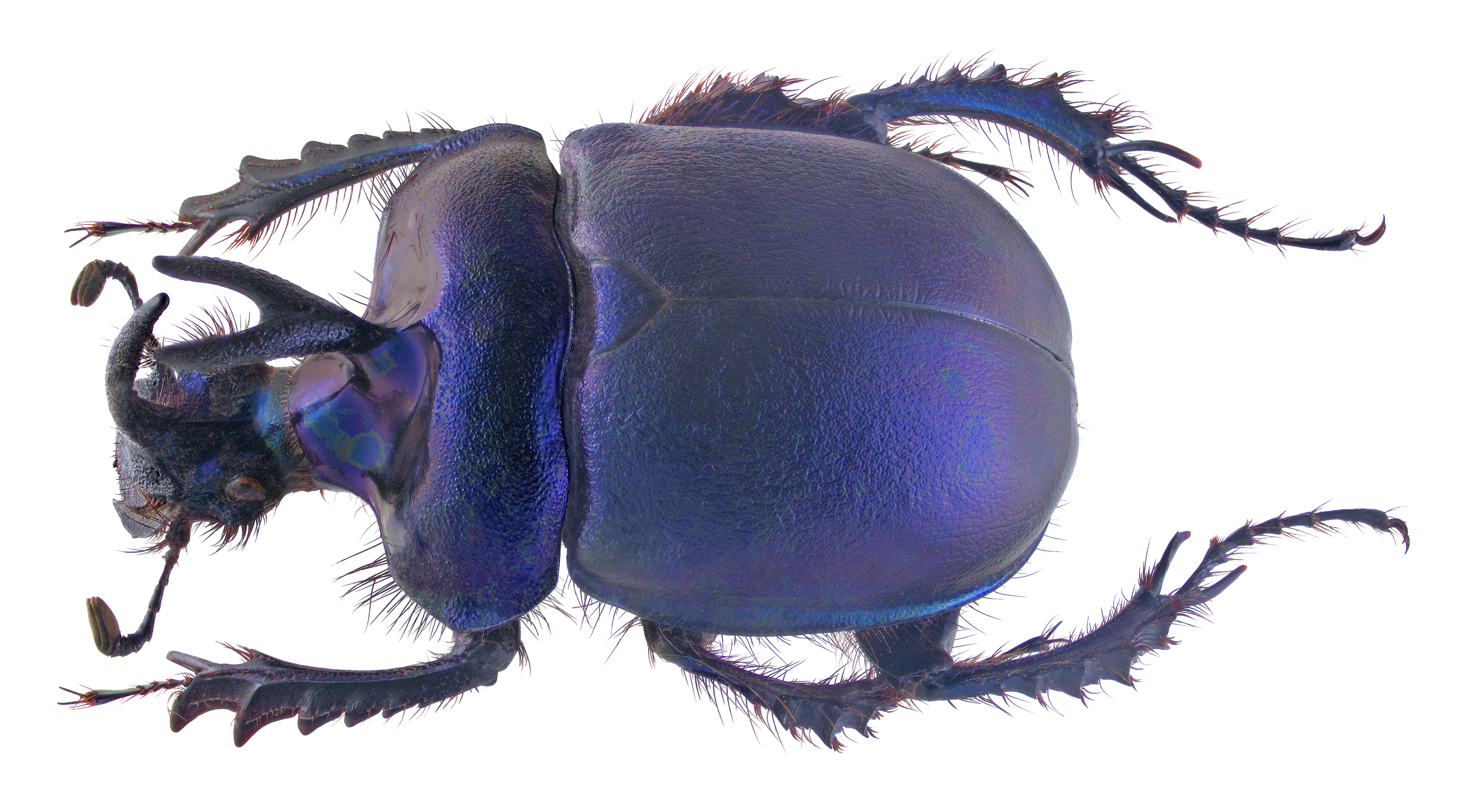 Enoplotrupes sharpi Rothschild & Jordan, 1893 Male Familie: Geotrupidae Groesse: 32 mm Fundort: Thailand, Chiang Noi, 1986 det. U.Schmidt Foto: U.Schmidt, 2019